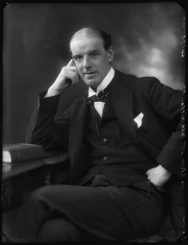 Lord Macmillan